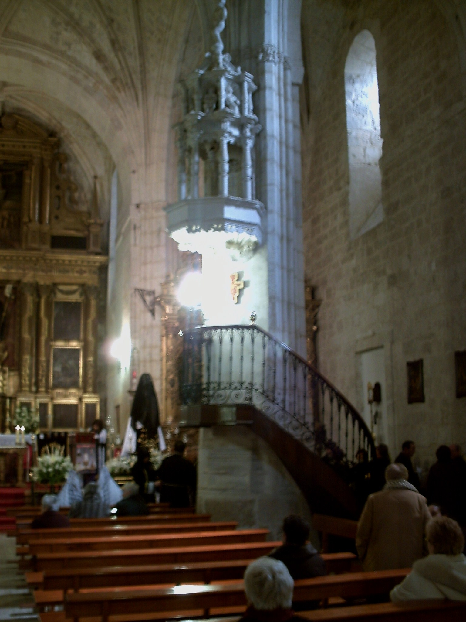 Púlpito en la Iglesia de San Millán.